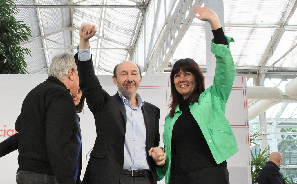 Acto en el Invernadero de Arganzuela de Madrid de la candidatura de Alfredo Pérez Rubalcaba a la secretaría general del PSOE con la asistencia de Felipe González y Patxi Lópes